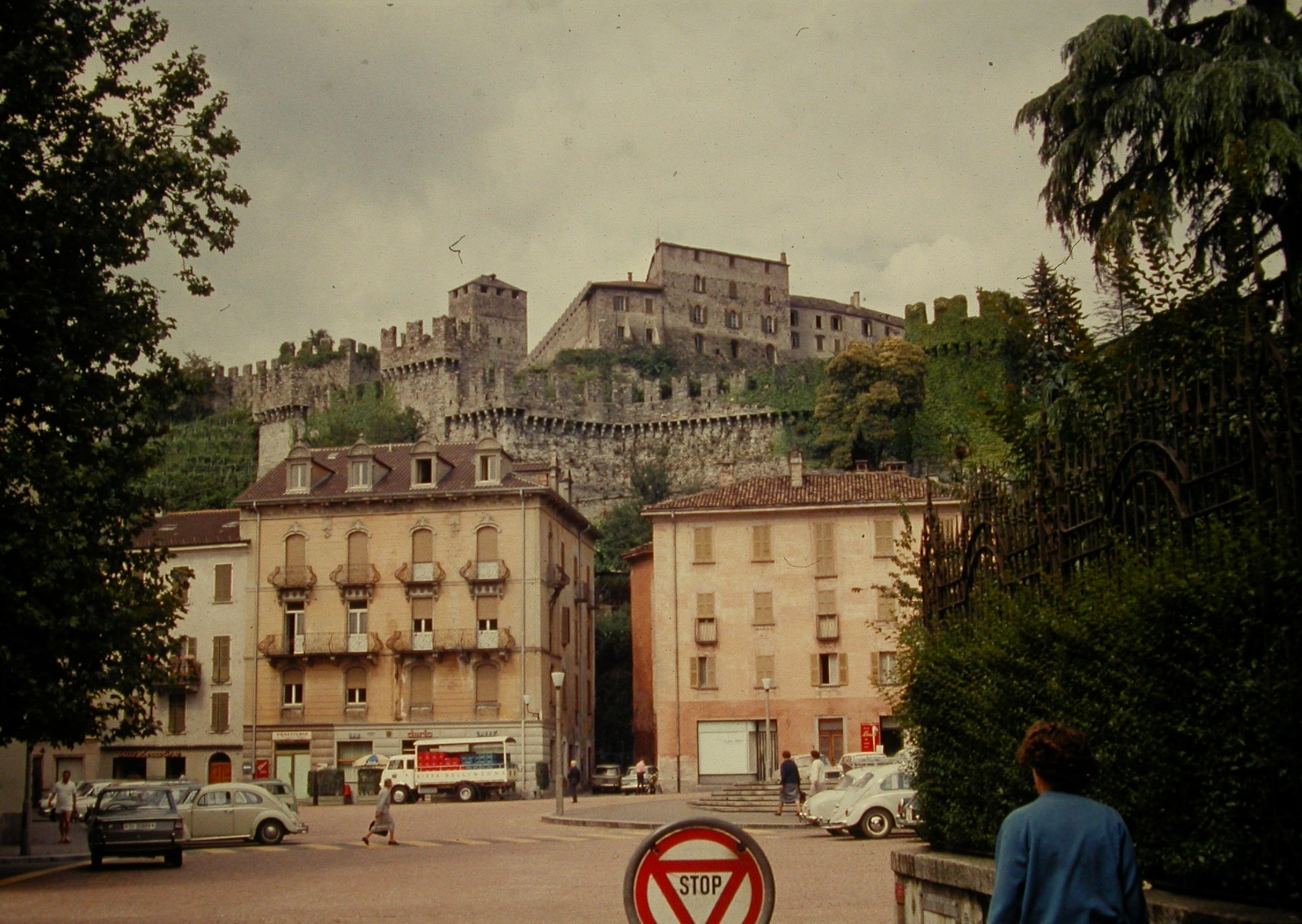 Bellinzona